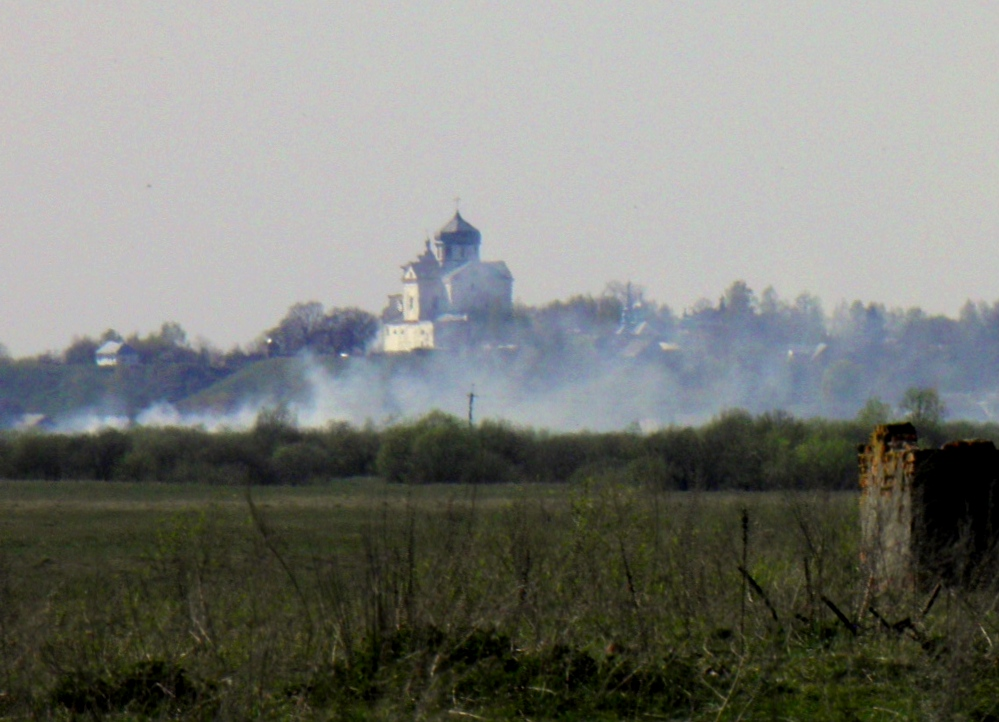 Вид на Старий Чарторийськ